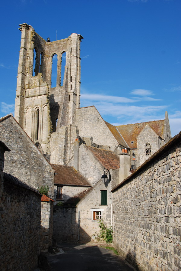 Vue depuis une petite rue sur la tour en ruine de la basilique de Larchant